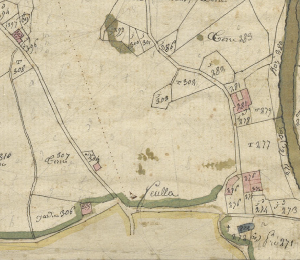 El Veïnat d'Amunt de Fullà en el Cadastre napoleònic del 1812 (Arxius Departamentals dels Pirineus Orientals)